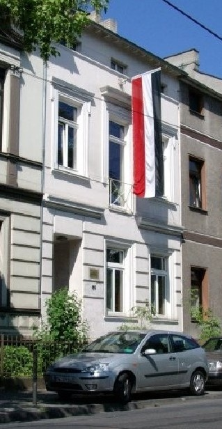 Denkmalgeschütztes Haus (Sitz des VDSt zu Bonn), Bonner Talweg 80, Bonn-Südstadt